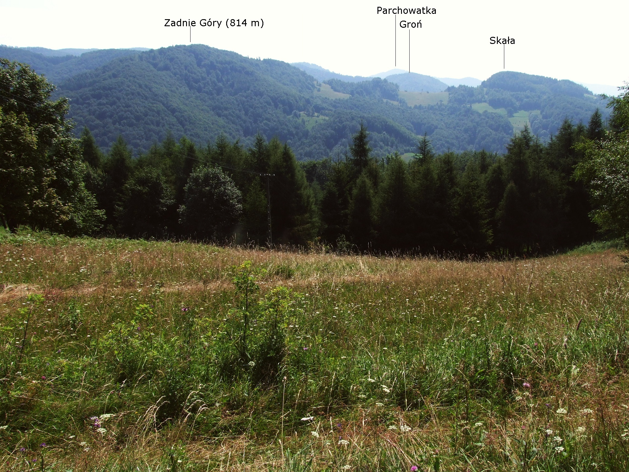 Widok na południowo-wschodnią stronę z polany Kretówki w Paśmie Jaworzyny Krynickiej